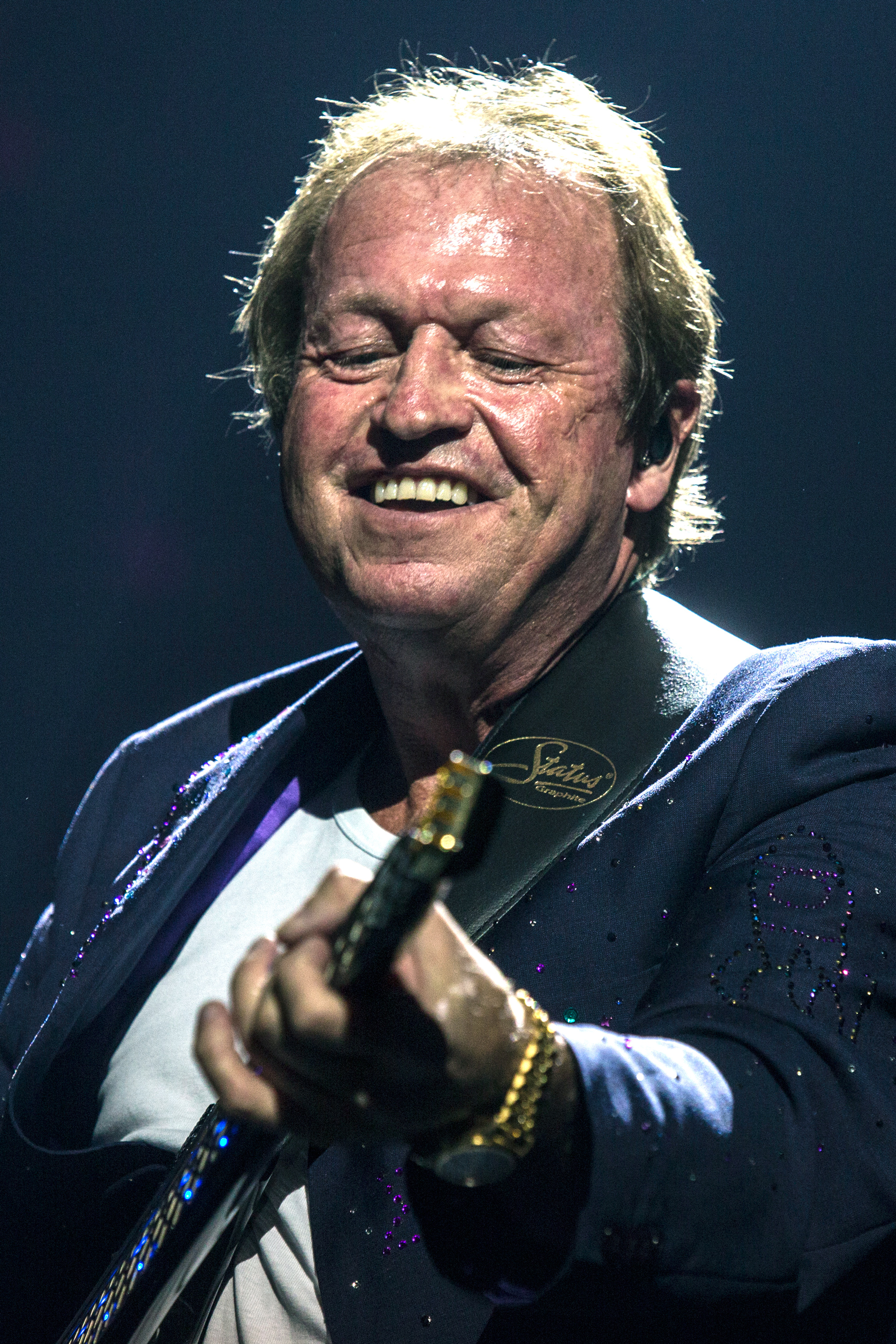 Der britische Musiker Mark King (Sänger und Bassist von Level 42) bei der AIDA Night of the Proms 2013 in der Festhalle Frankfurt.